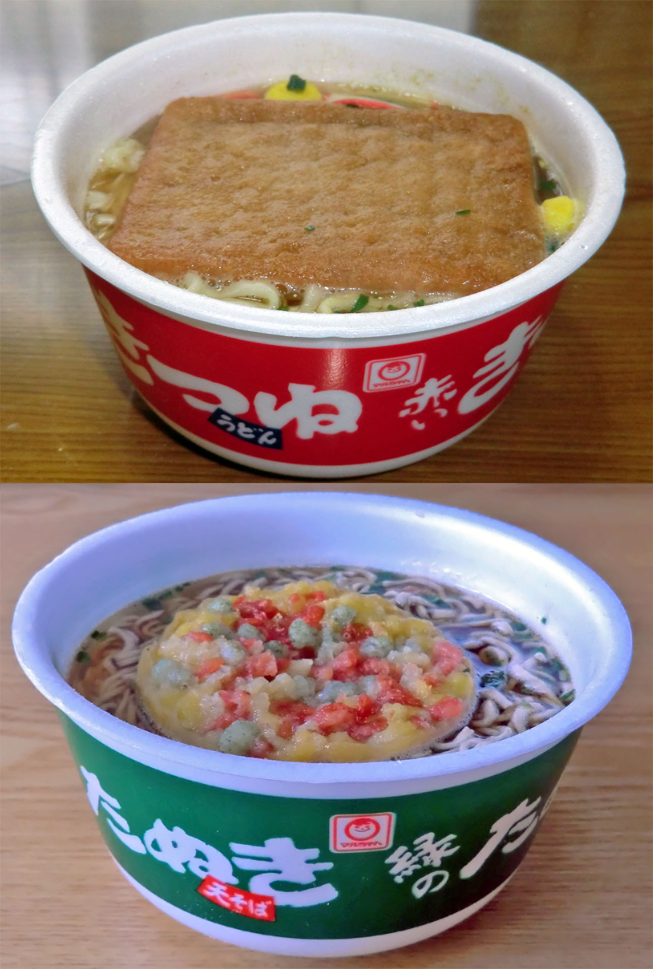 赤いきつねと緑のたぬき